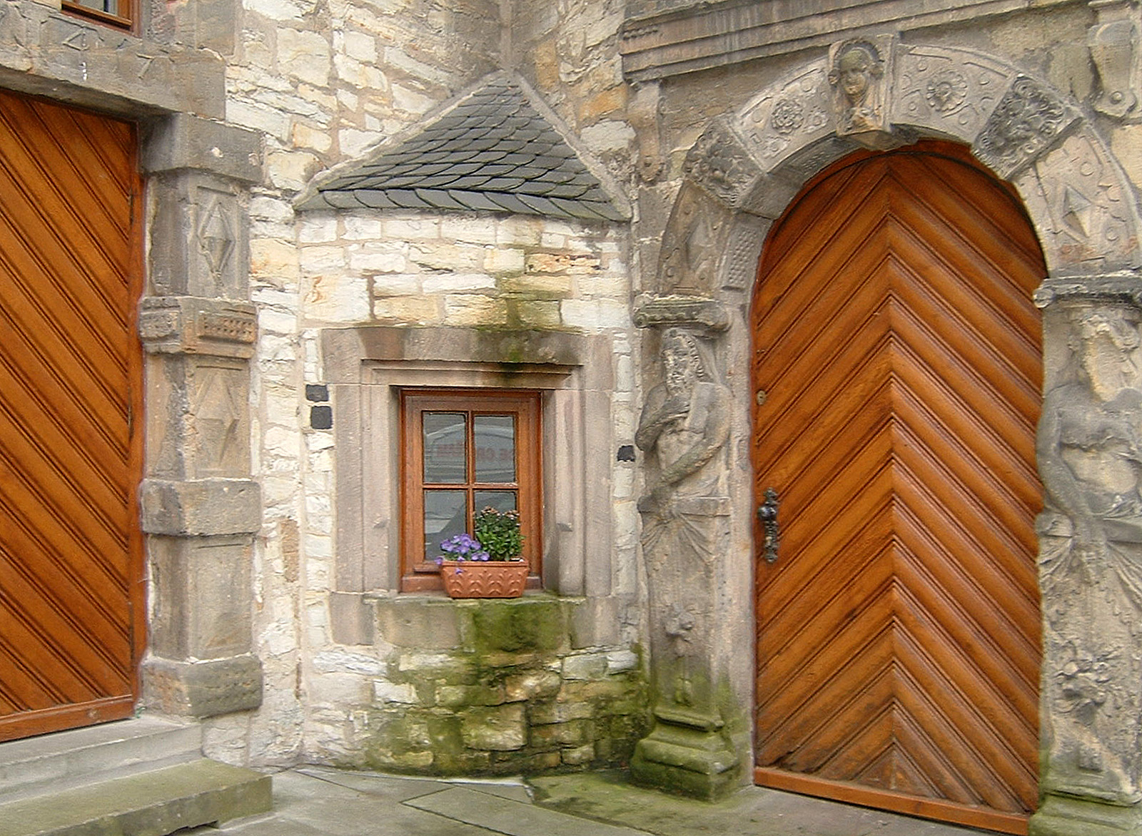 Die Wewelsburg bei Büren, Deutschland